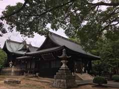 窪八幡宮の本殿・拝殿